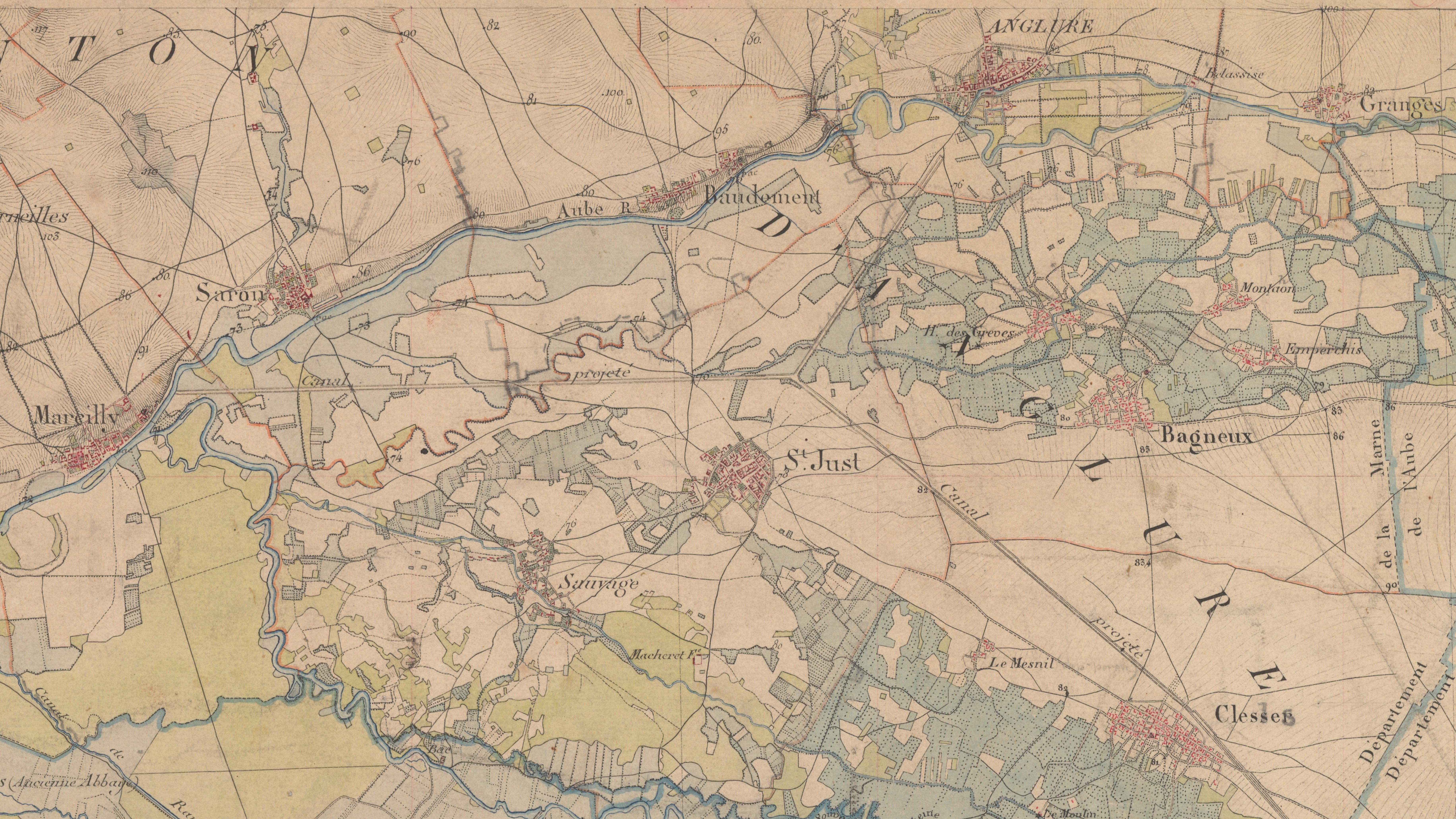 Extrait de carte d'état major de 1835 montrant la canal du docteur. 51032 Bagneux.